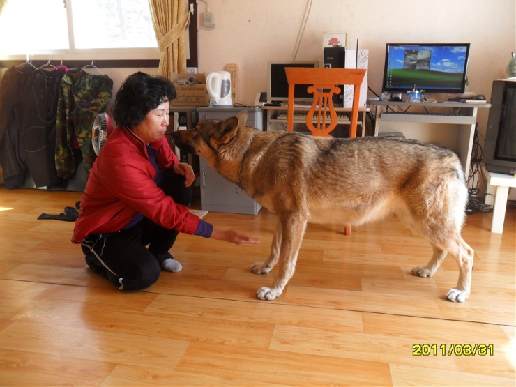 늑대아빠가 키우는 울프독